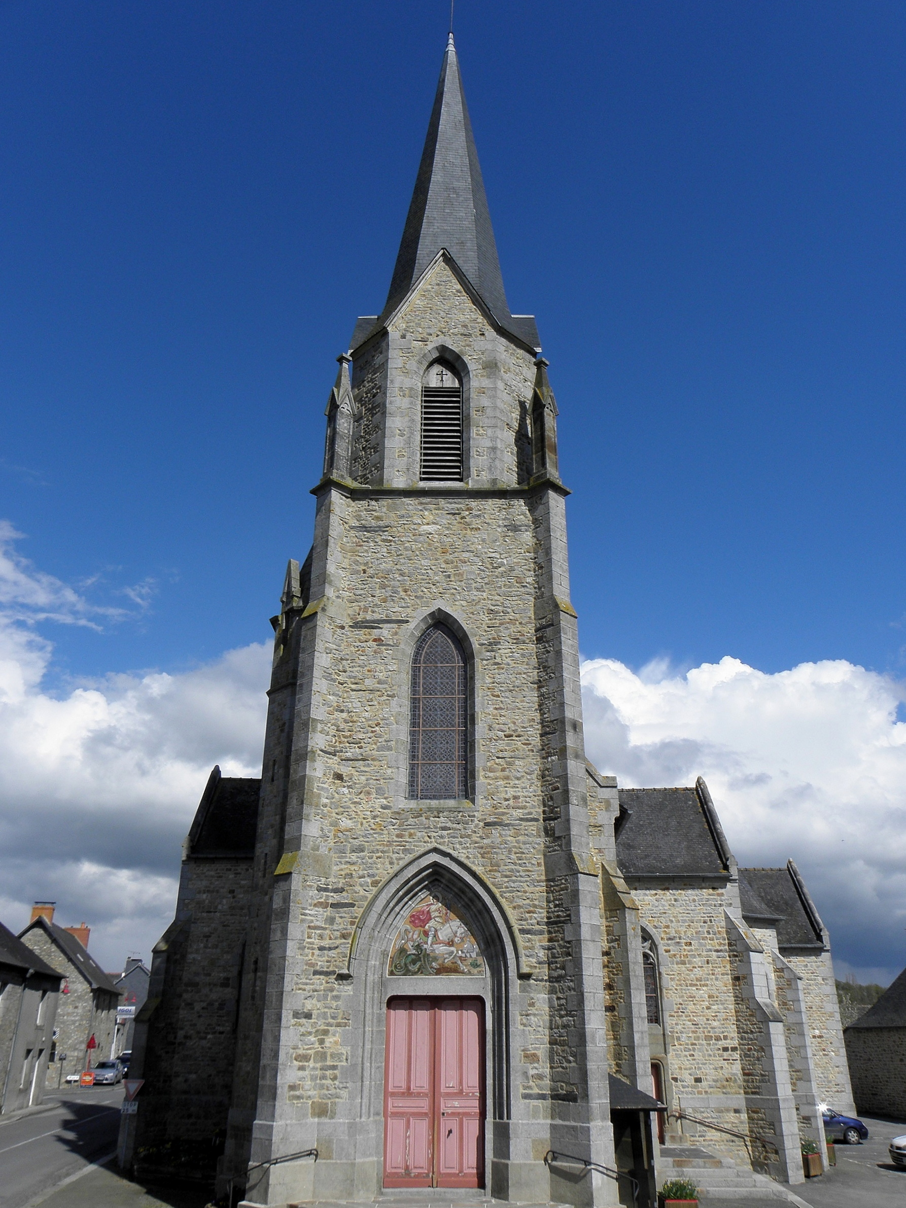 Église Saint-Georges de Châtillon-en-Vendelais (35). Façade occidentale. Tour-clocher de Jourdain, mosaïque d'Odorico.